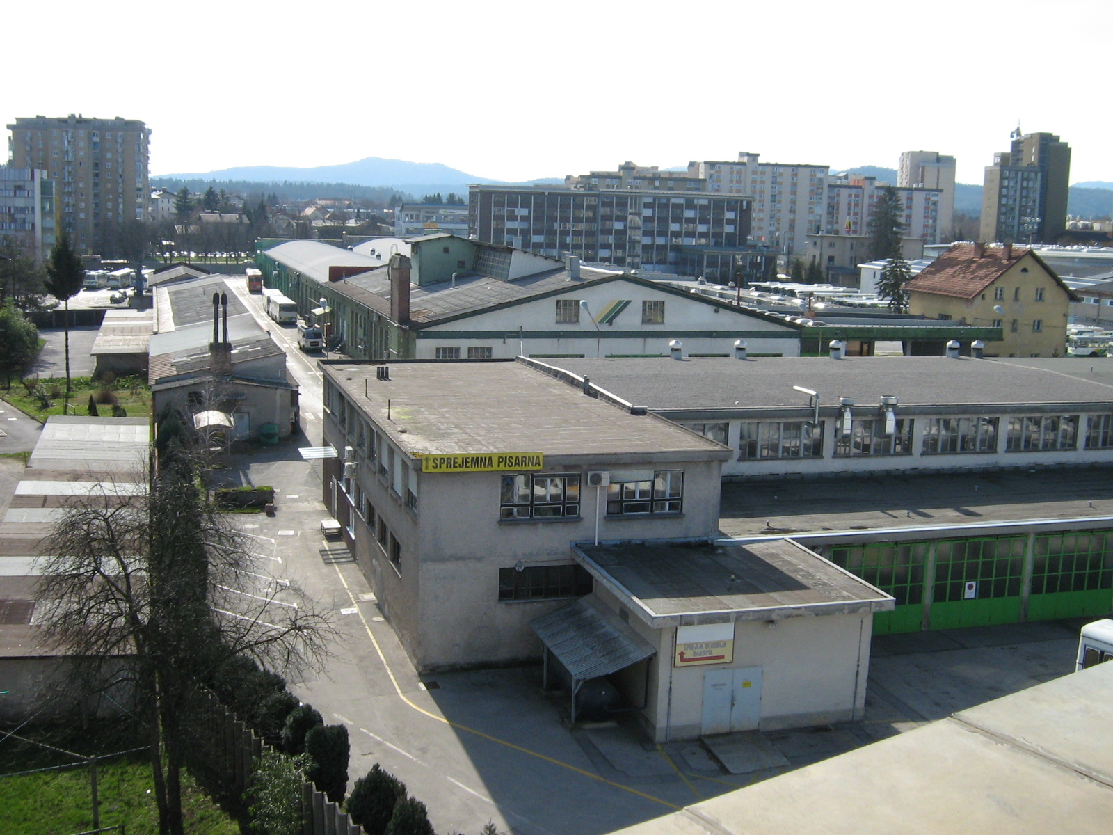 Sprejemna pisarna delavnic ter karoserijskega oddelka Ljubljanskega potniškega prometa. Avtor: Uporabnik:BurekBuster